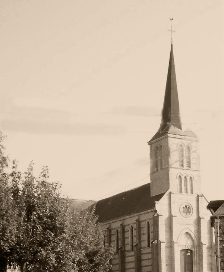 Eglise de Gerville photo personnelle retouchée.